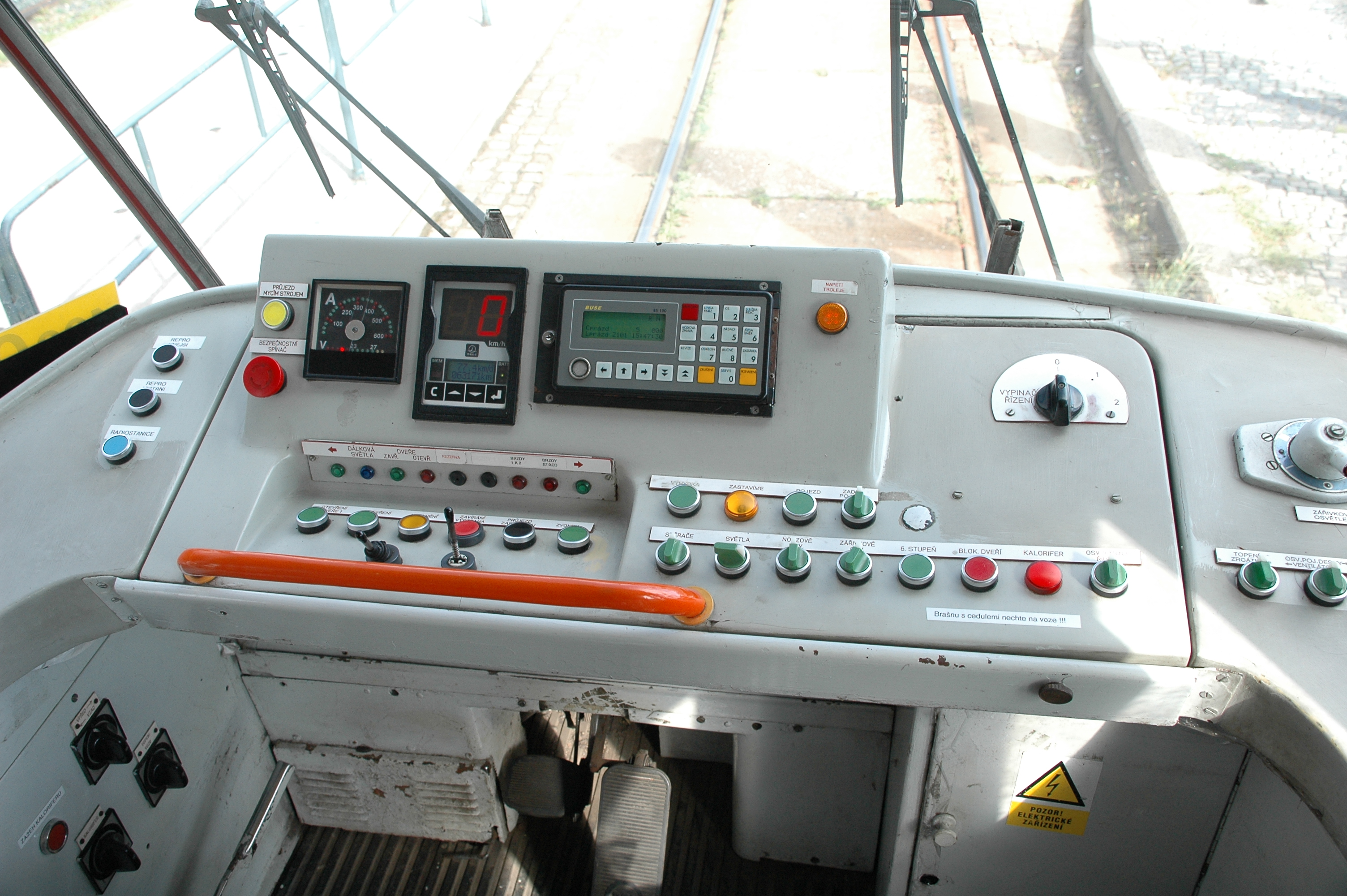 Rozlučková jízda s posledním ceduláčem na lince 1